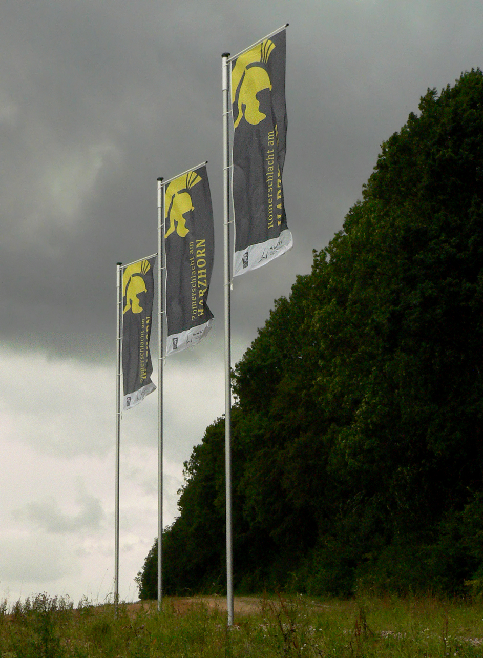 Fahnen an Harzhorn